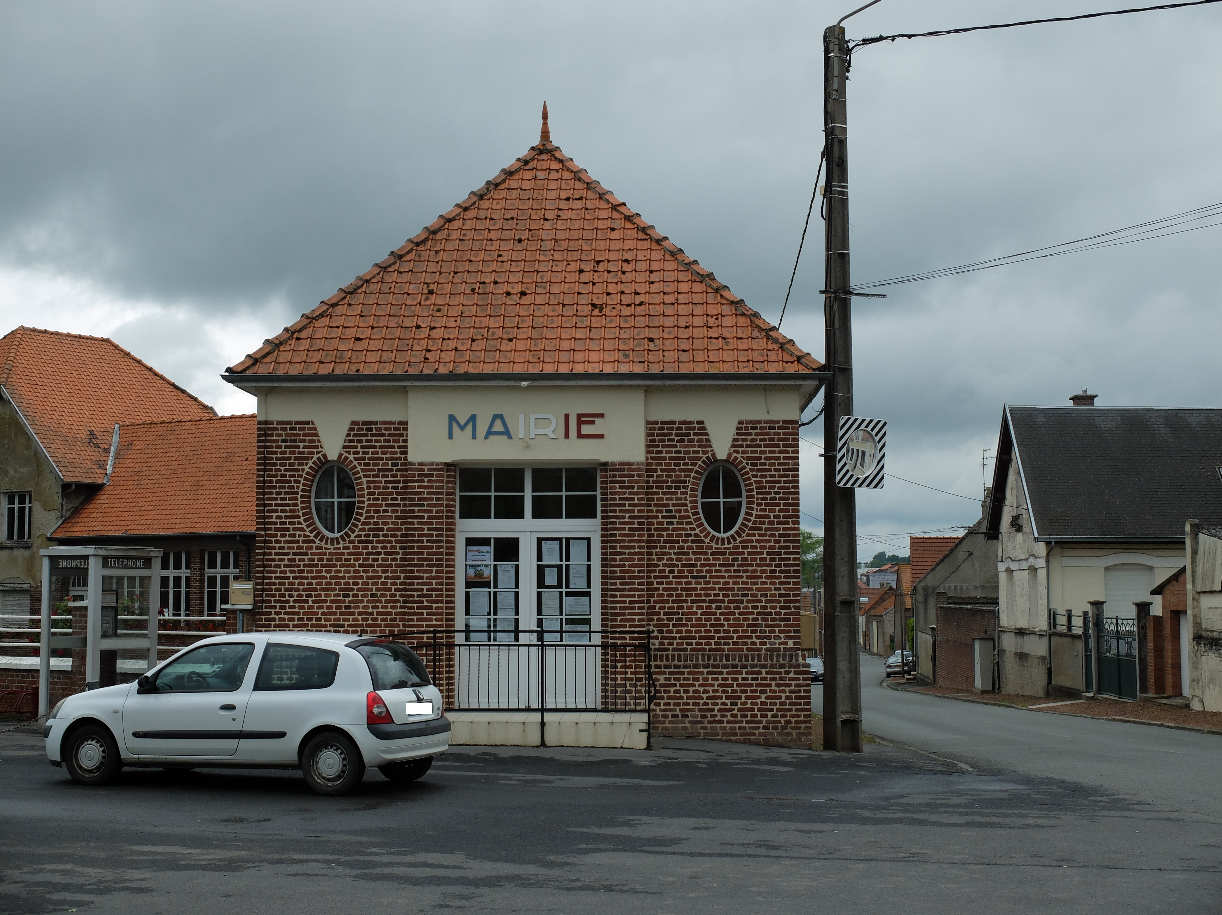 Vue de la mairie de Pronville-en-Artois.